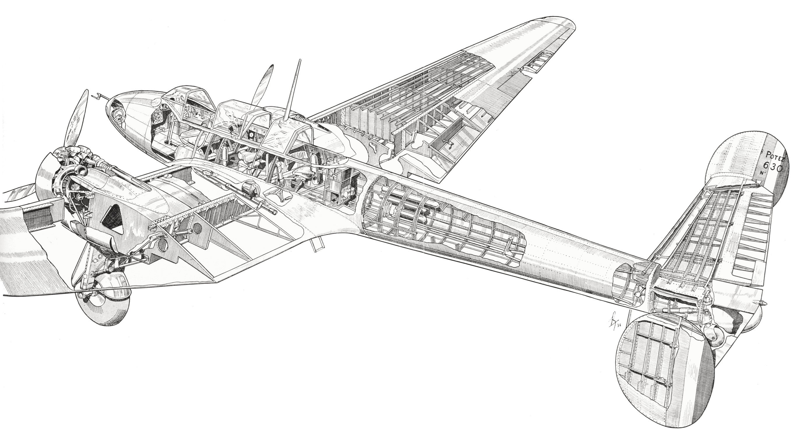 Ecorché du Potez 630